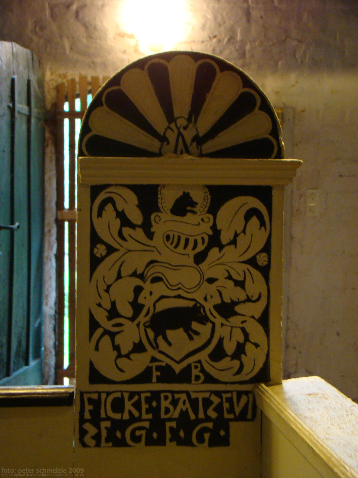 Wappen des Ficke von Bassewitz am Patronatsgestühl (16. Jhd.) der Dorfkirche in Basse